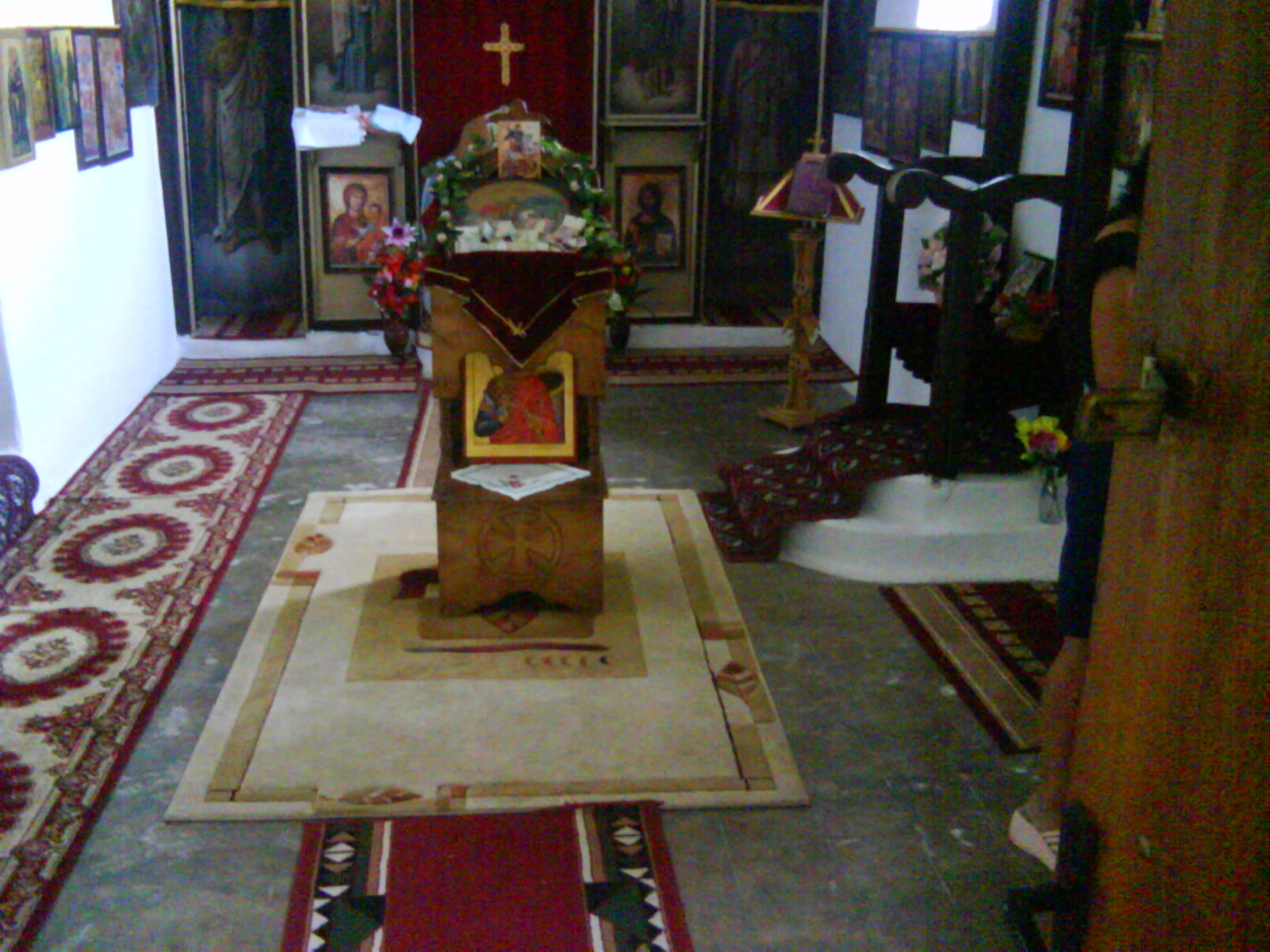 St. George Church in Valandovo